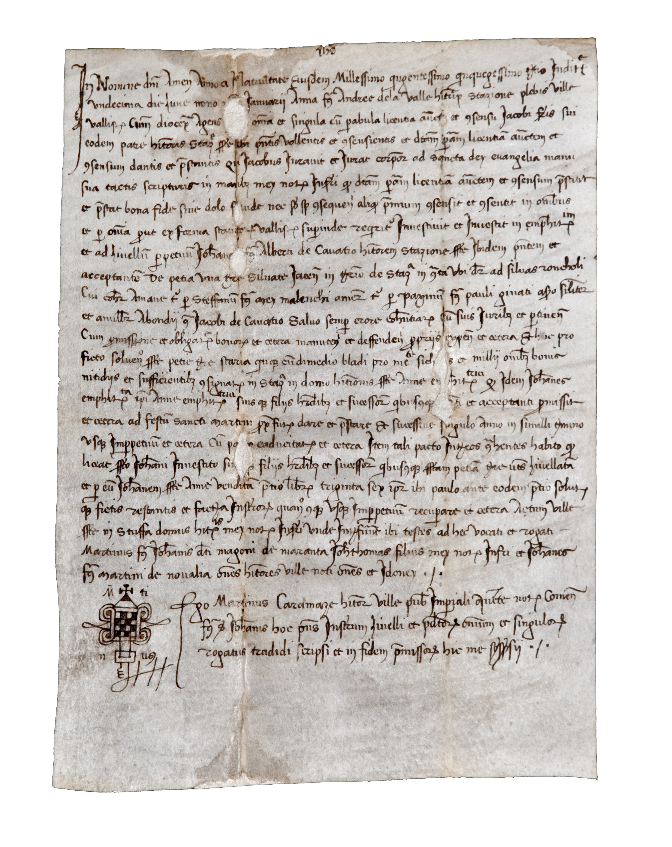 Archivio Pietro Pensa, Pergamene 4, 67